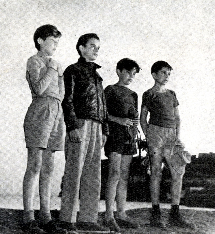 Mario Girotti (aka Terence Hill) il secondo a sinistra